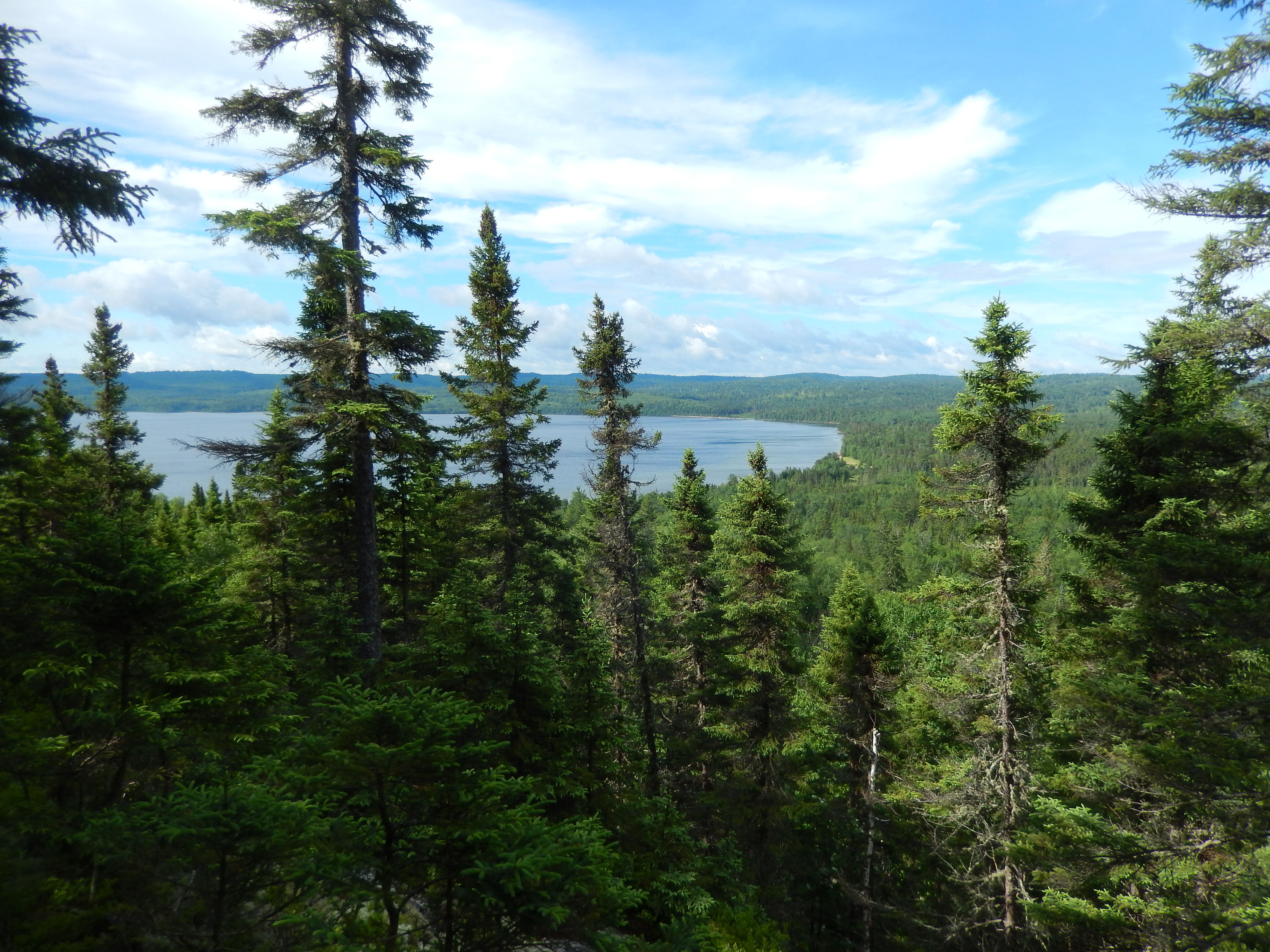 Lac Normand dans la réserve faunique du Saint-Maurice.